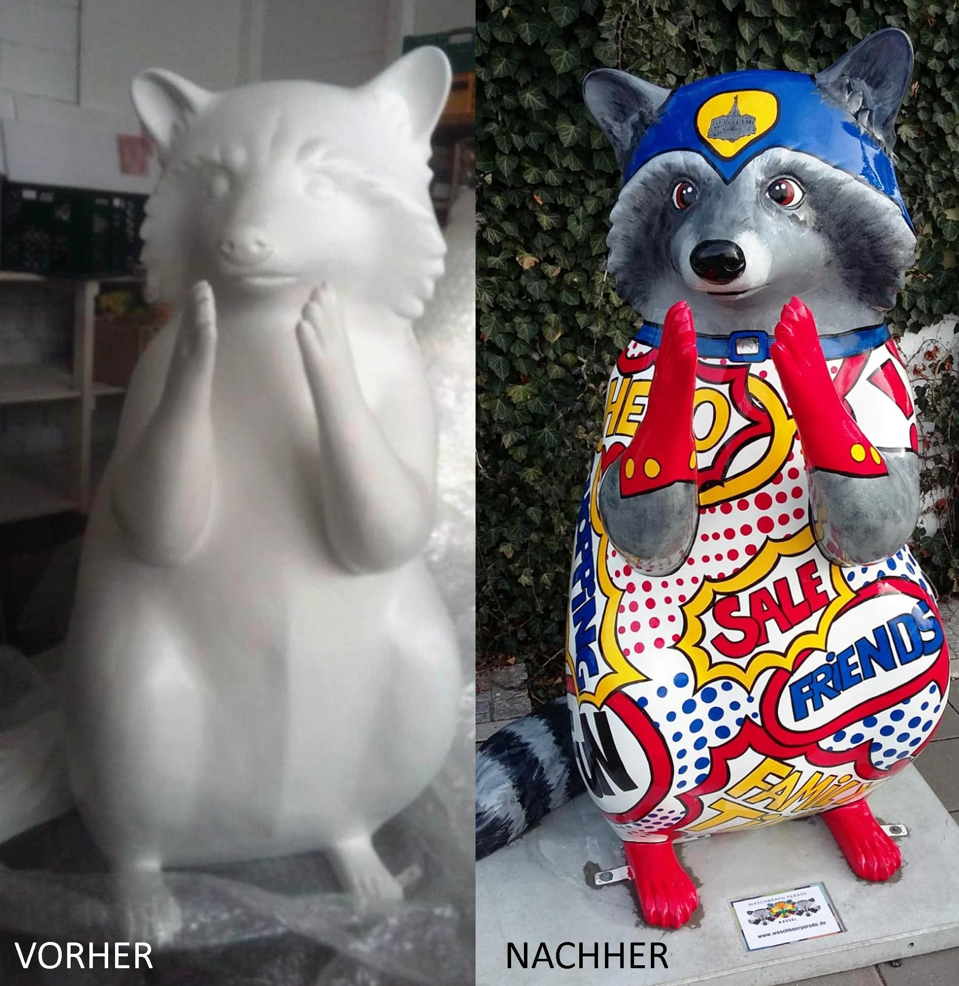 Veranschaulicht wird das GfK Rohmodell im Vergleich zur fertig gestalteten und lackierten Ausstellungsfigur am Beispiel der ersten öffentlichen Figur der Waschbären Parade Kassel